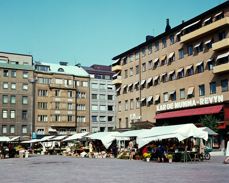 Torghandel framför Folkan på Östermalmstorg. Vy från Sibyllegatan Referenser Upphov: Gram, Ingemar (1908-1986). Tid: 22 augusti 1968 Beteckning: Fotonummer DIA 15242